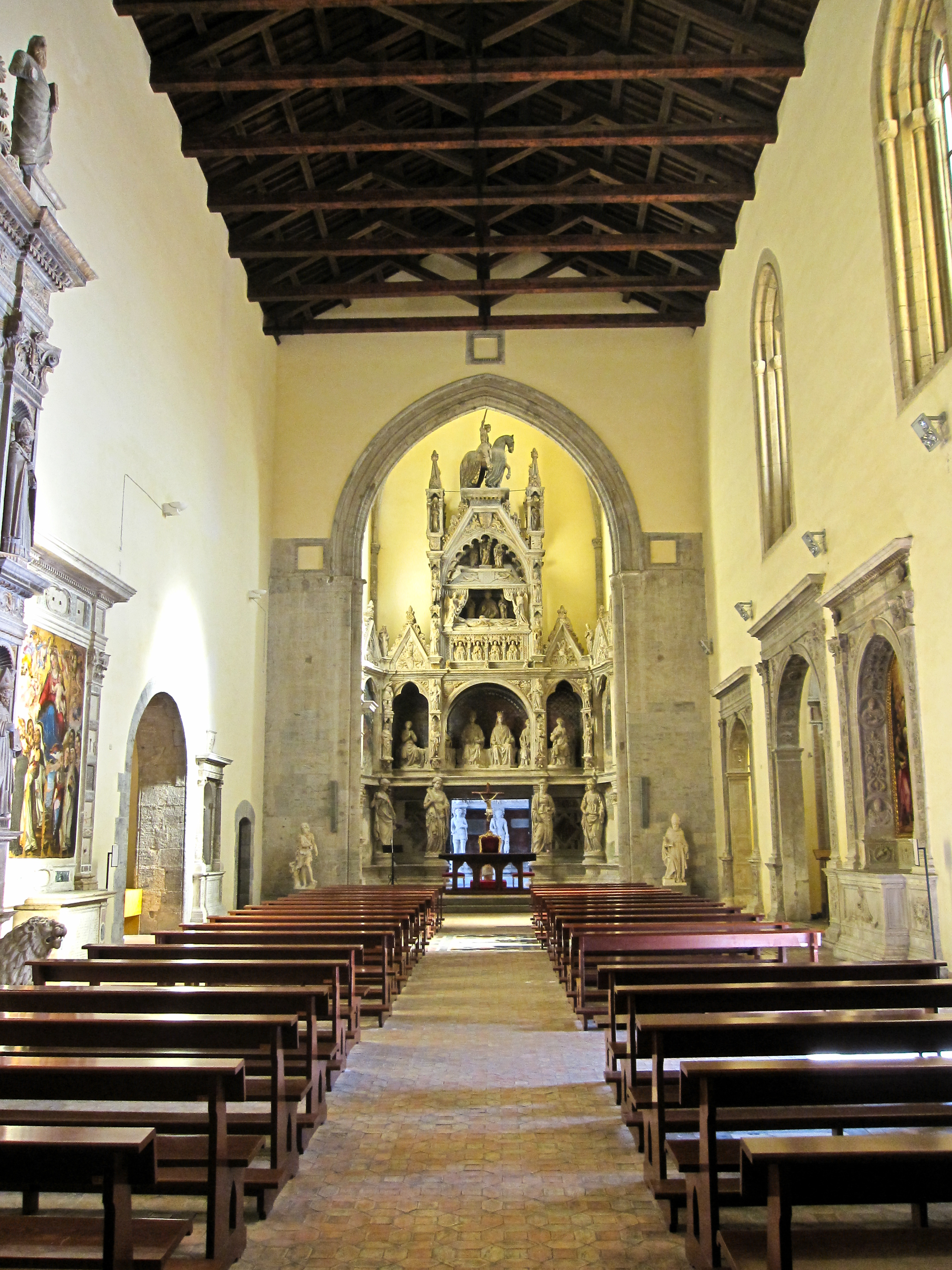 L'interno Chiesa di San Giovanni a Carbonara - Napoli